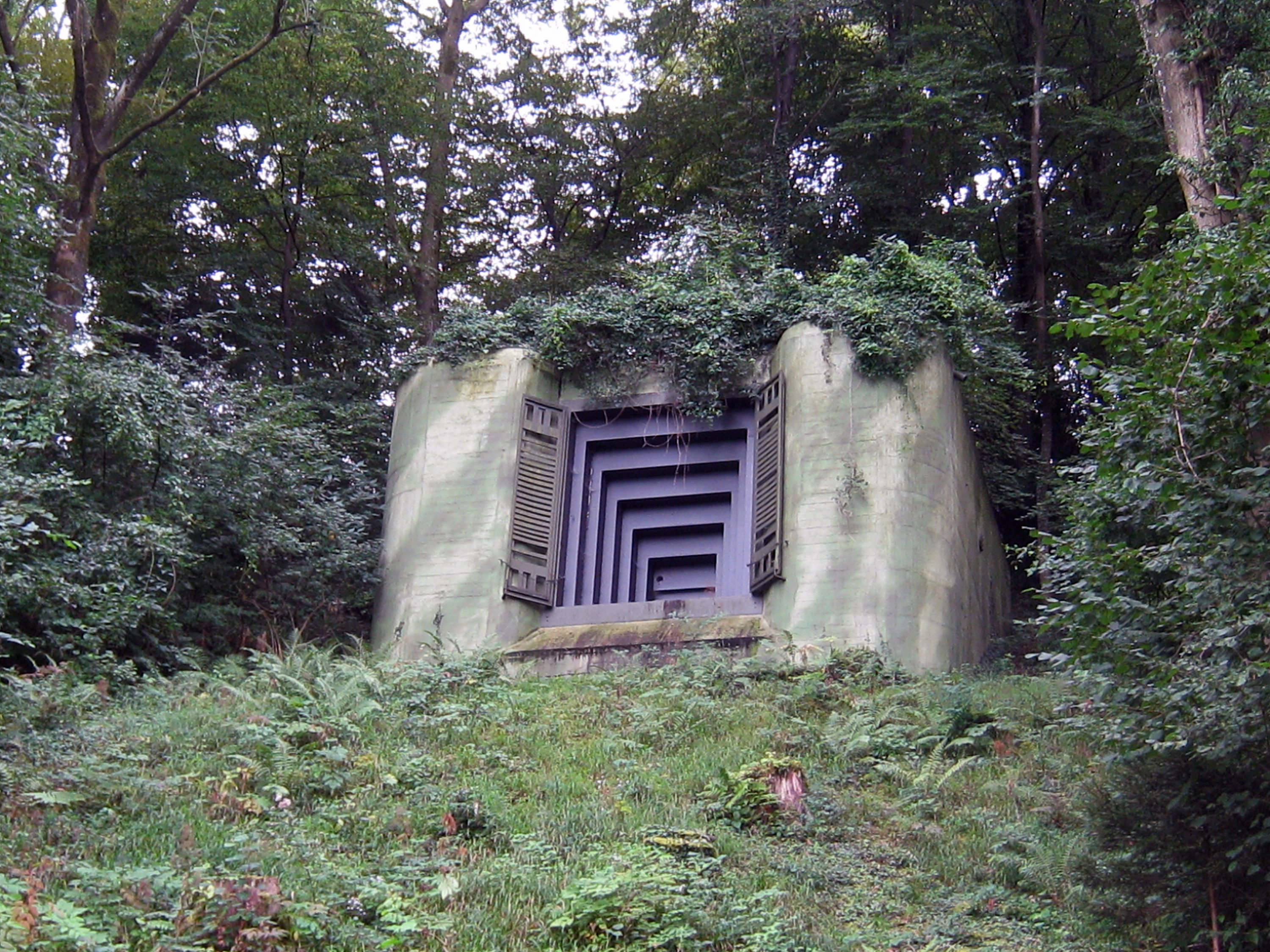 Scharte der Bunkerkanone 4 der Festung Heldsberg, St. Margrethen, Kanton St. Gallen